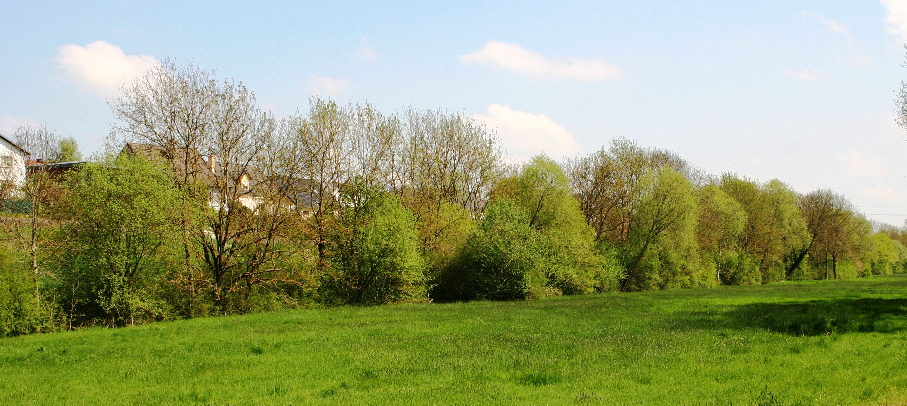 Den Dall vun der Rouerbaach am Schollesfeld. Kategorie:Baachen zu Lëtzebuerg